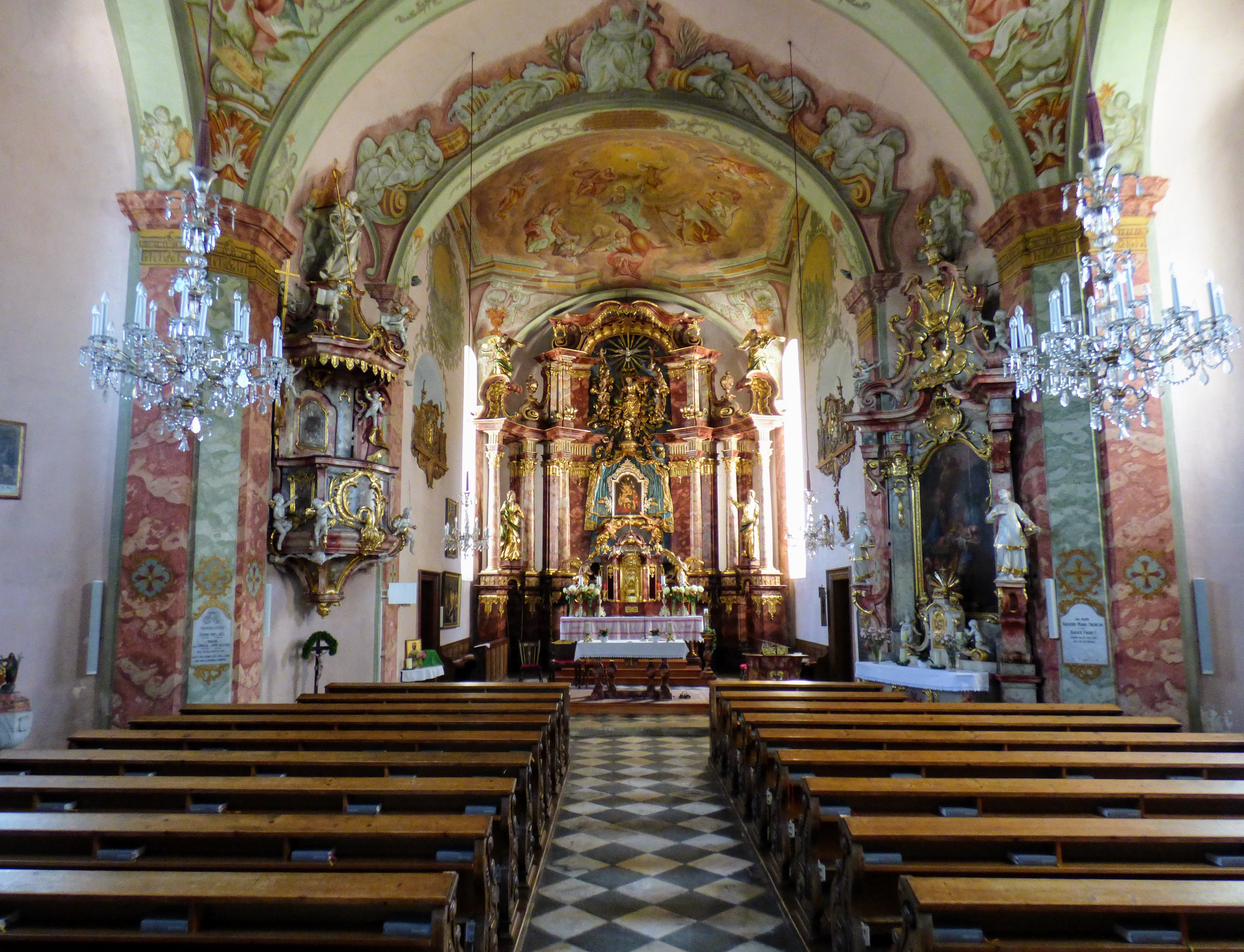 Inneres der Kath. Pfarrkirche Maria Hilf und St. Peter und Paul, Ebenthal in Kärnten